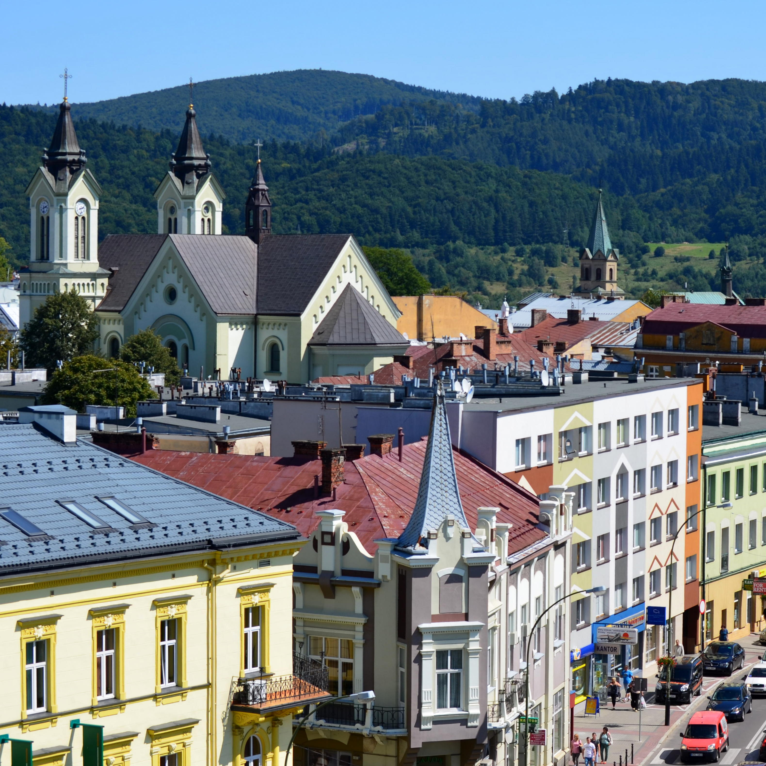 Sanok, von Kosciuszkistrasse aus gesehen, im Hintergrund das Salzgebirge (Aug. 2014)